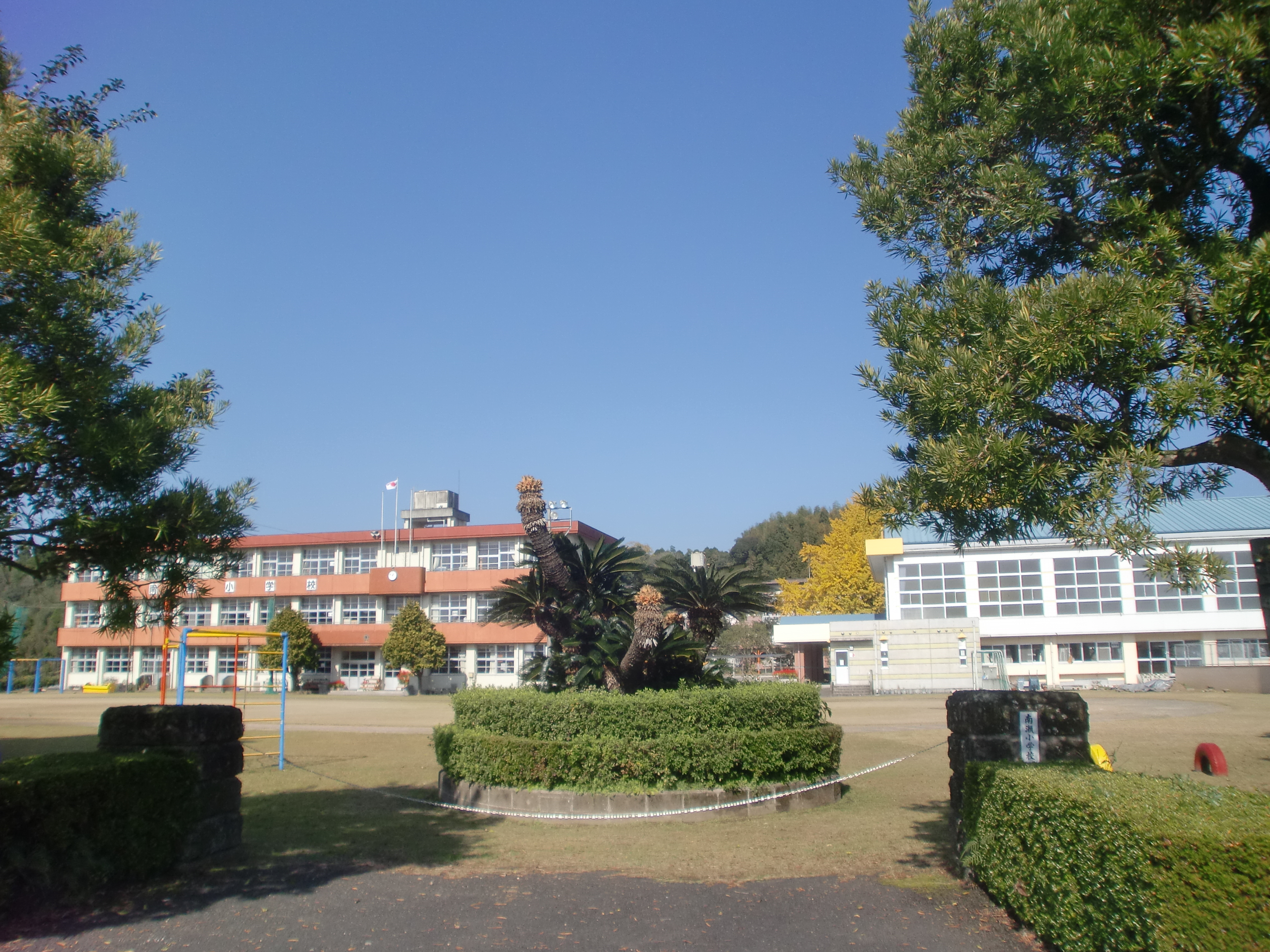 薩摩川内市立南瀬小学校の外観。